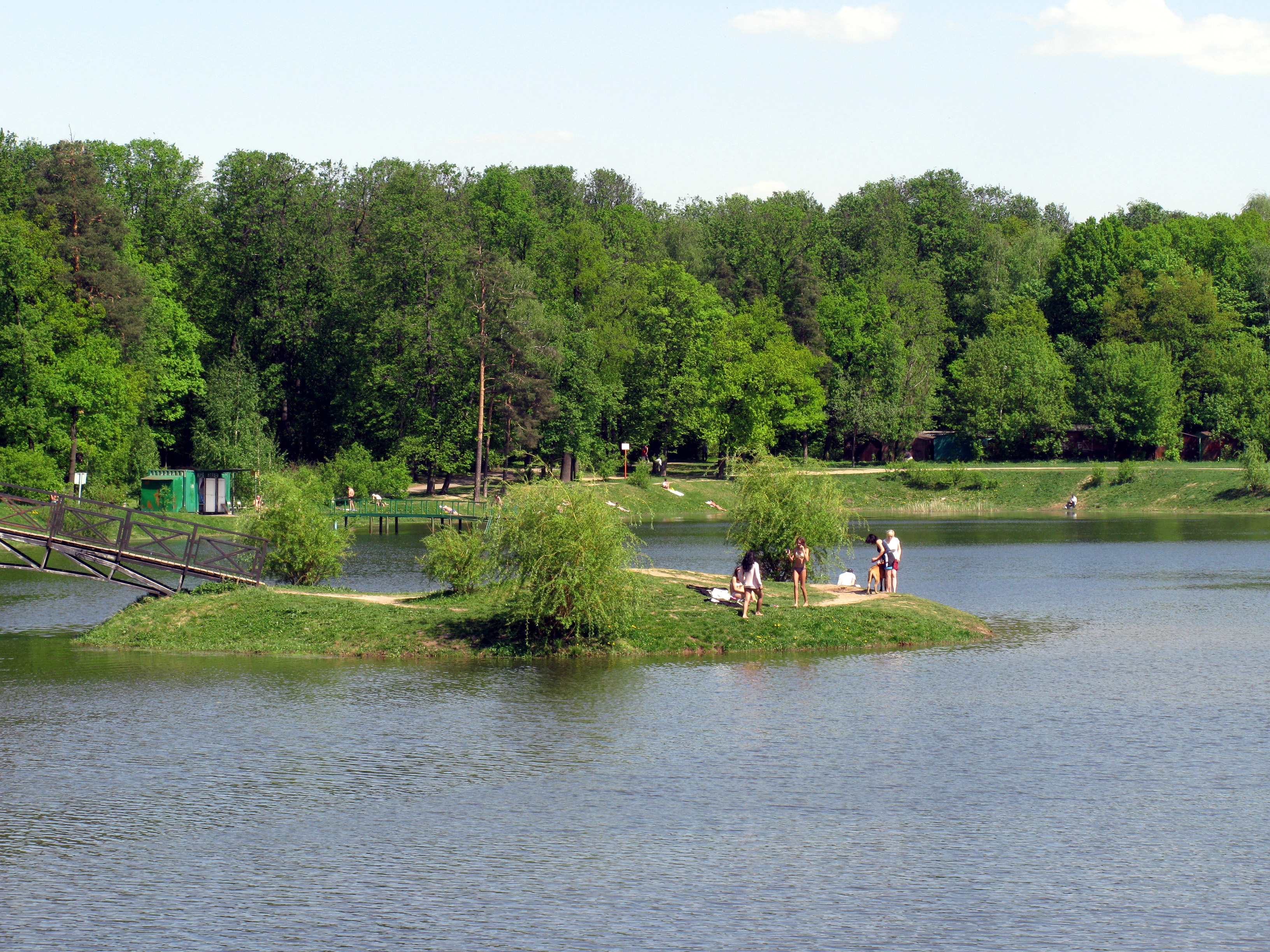 Бабаевский пруд на территории национального парка "Лосиный остров" (Гольяново, Москва).